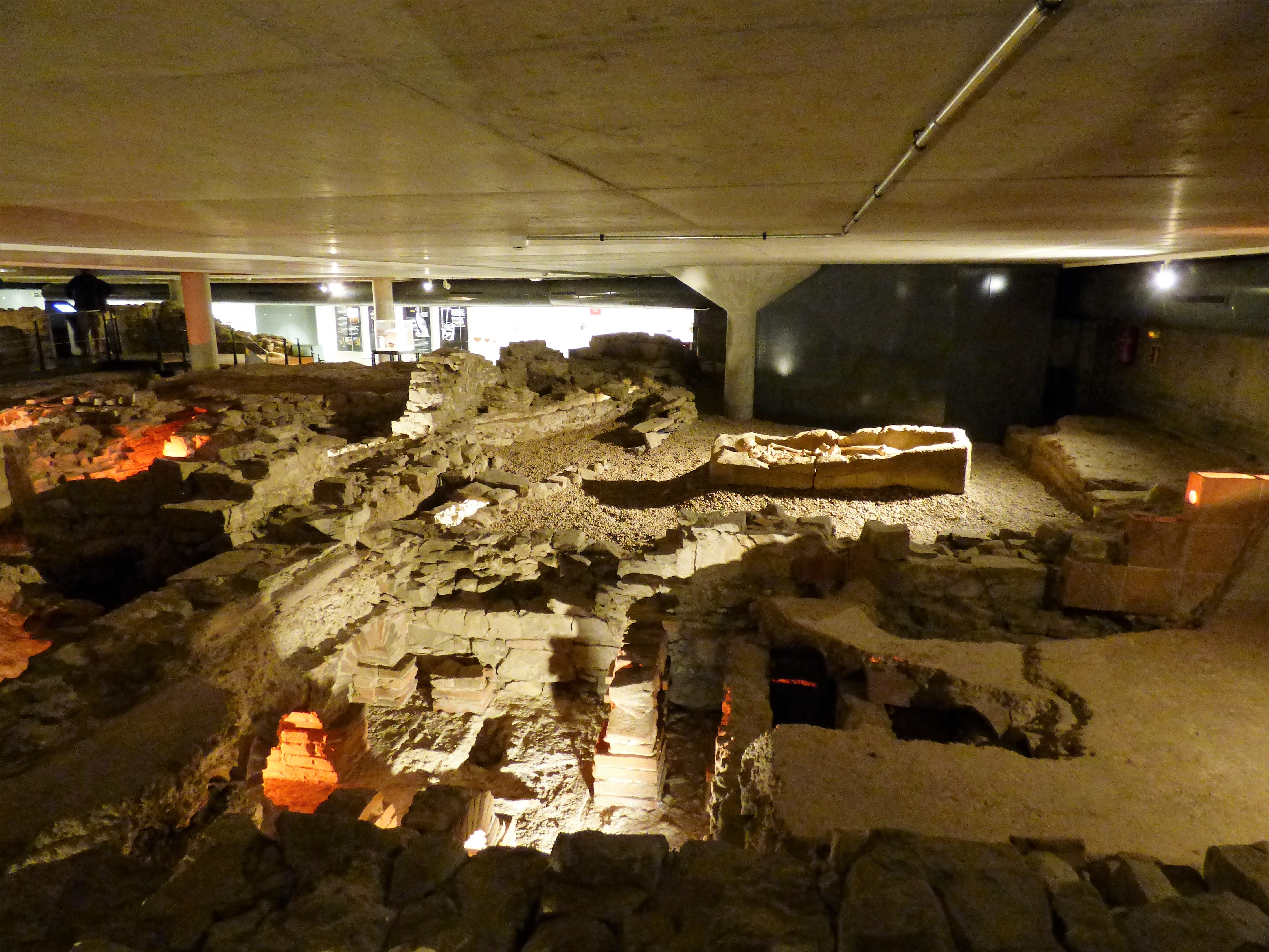 Baños públicos de época romana situados en Campo Valdés, en el barrio de Cimadevilla en la localidad asturiana de Gijón.